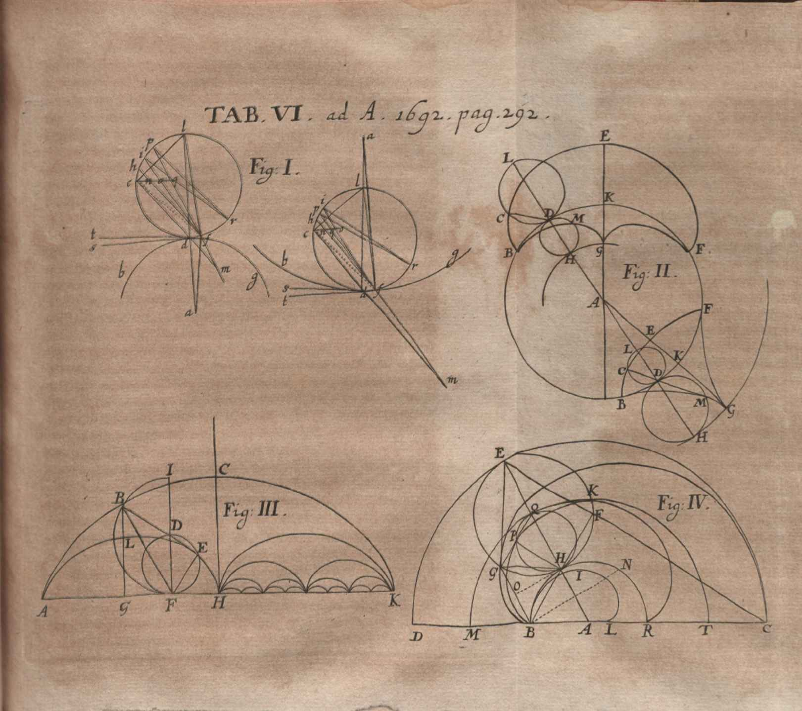 Illustration